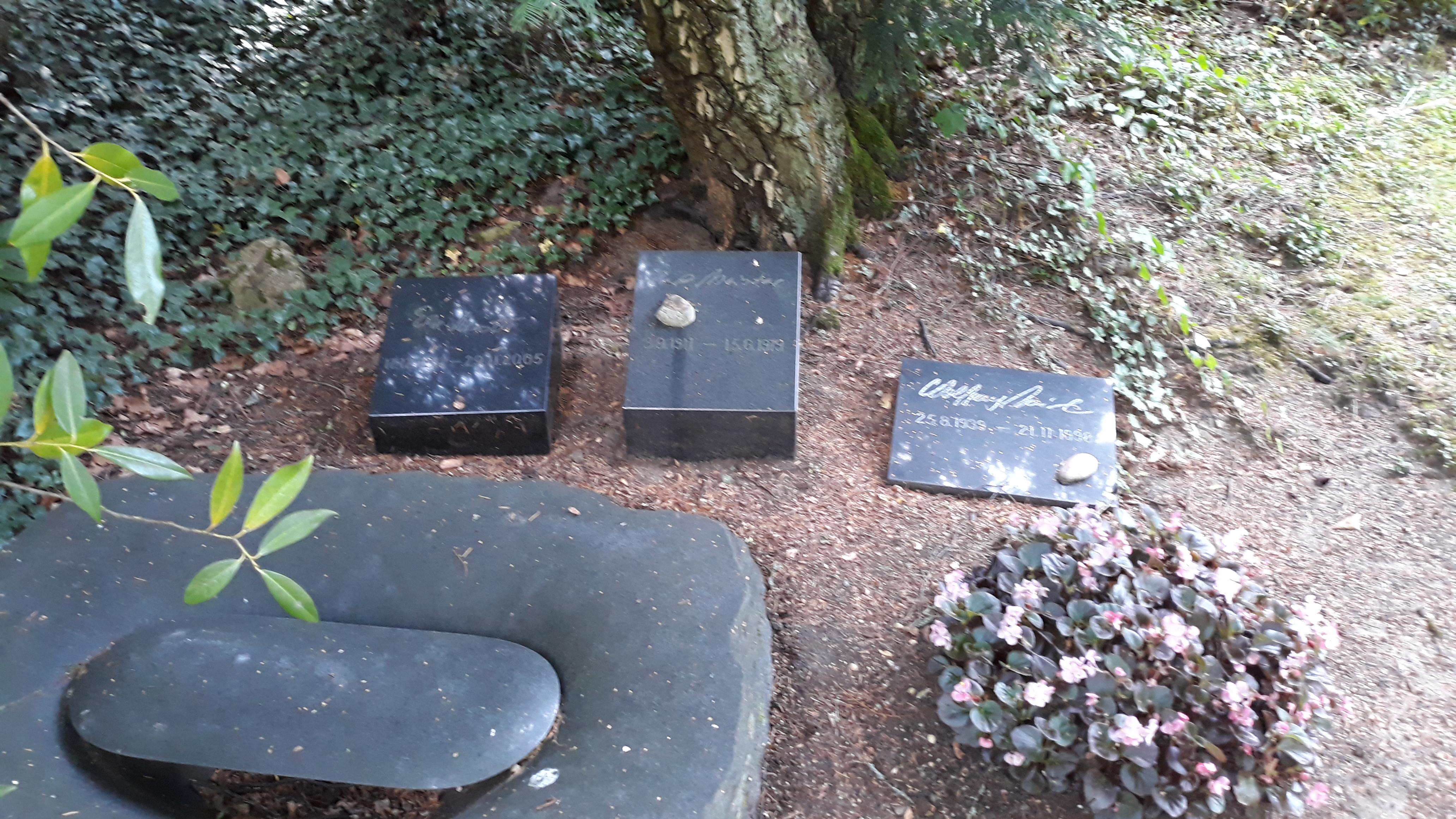 Das Grab des deutschen Schriftstellers (Lyrikers) Ernst Meister und seiner Ehefrau Else sowie Sohn Wolfgang auf dem Friedhof am Delstern in Hagen.